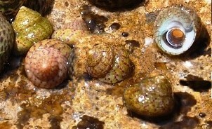 Gibbula divaricata (Trochidae)Mediterranean Sea